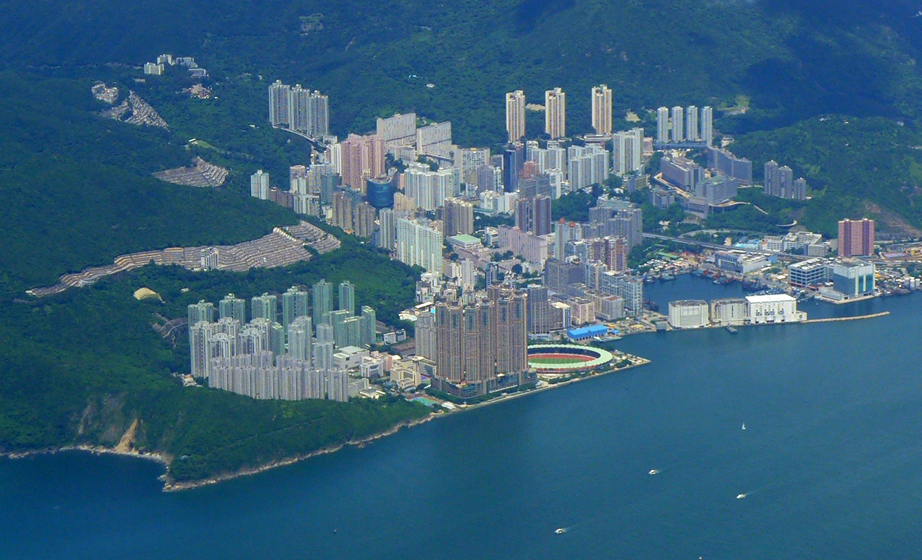 Chai Wan Overview